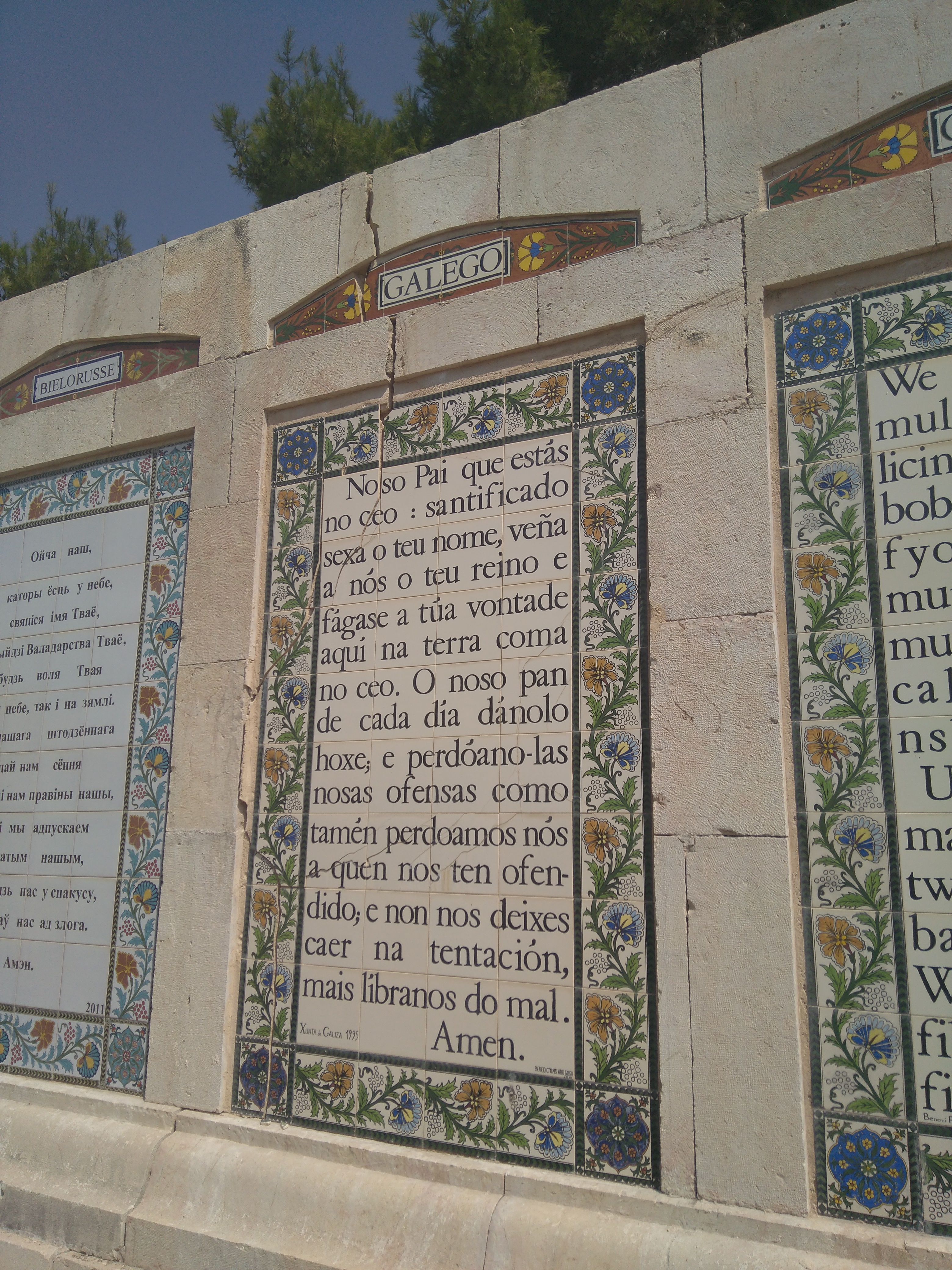 O Noso Pai en galego na Igrexa do Pater Noster en Xerusalén